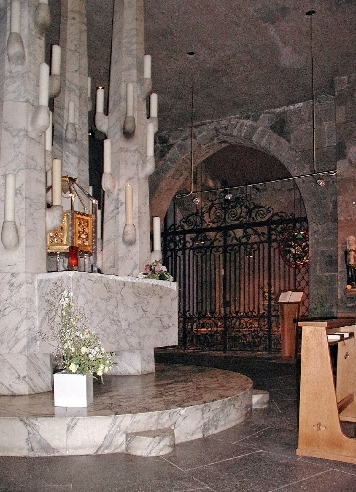 St. Kolumba, Köln